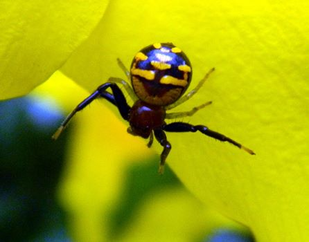 ചിലന്തി വർഗ്ഗം,കേരളത്തിൽ സാധാരണയായി കാണാം